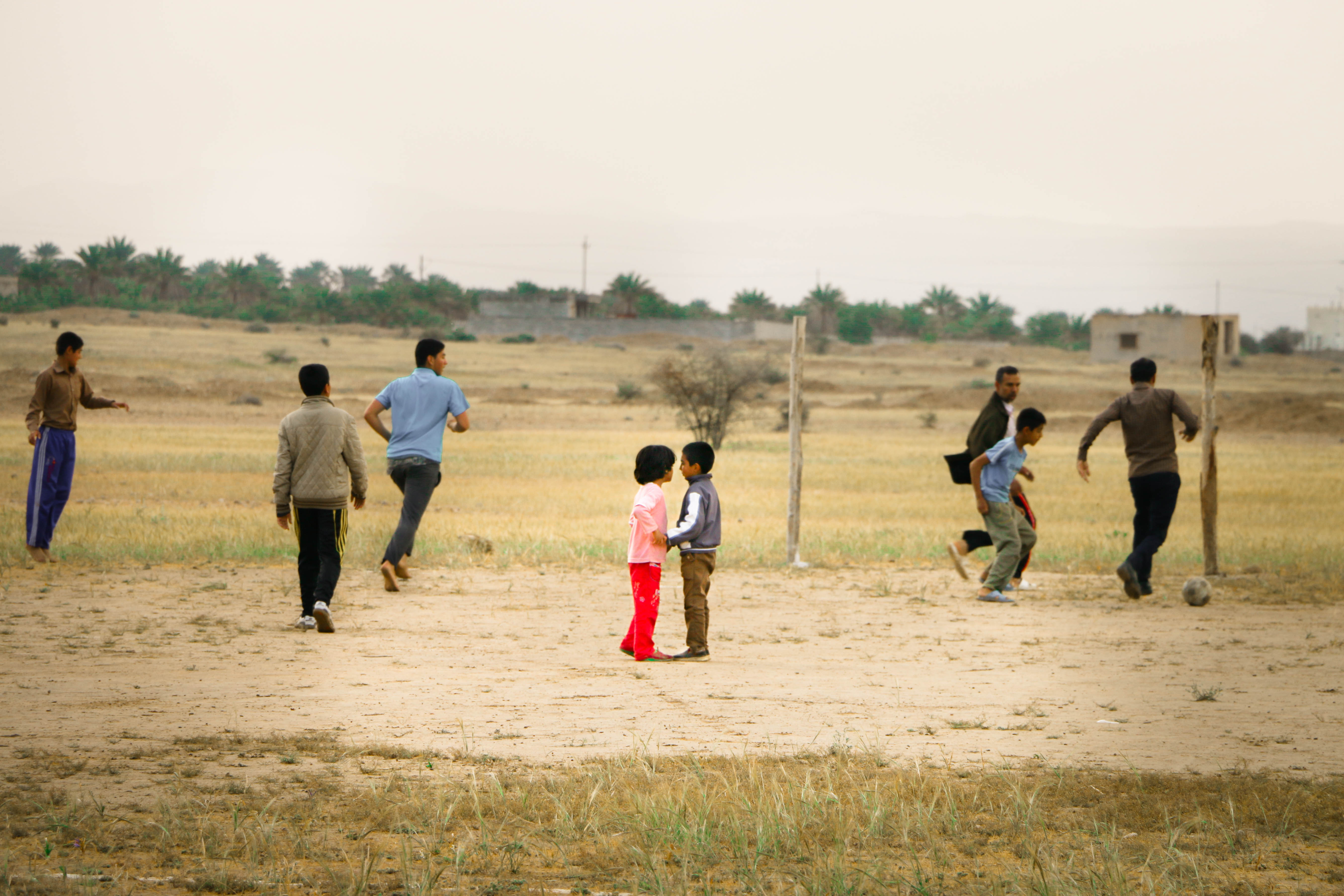 This photo was taken around the city. This photo has been taken in the country: Iran